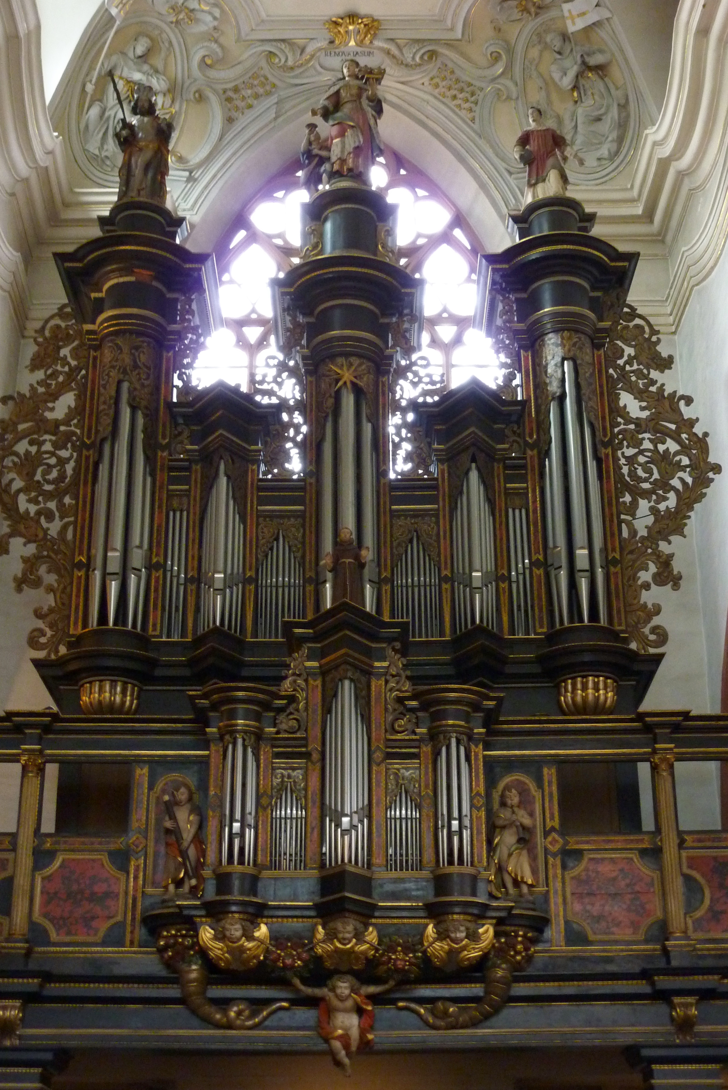 katholische Stadtkirche St. Sebastian in Limburg an der Lahn, Orgel